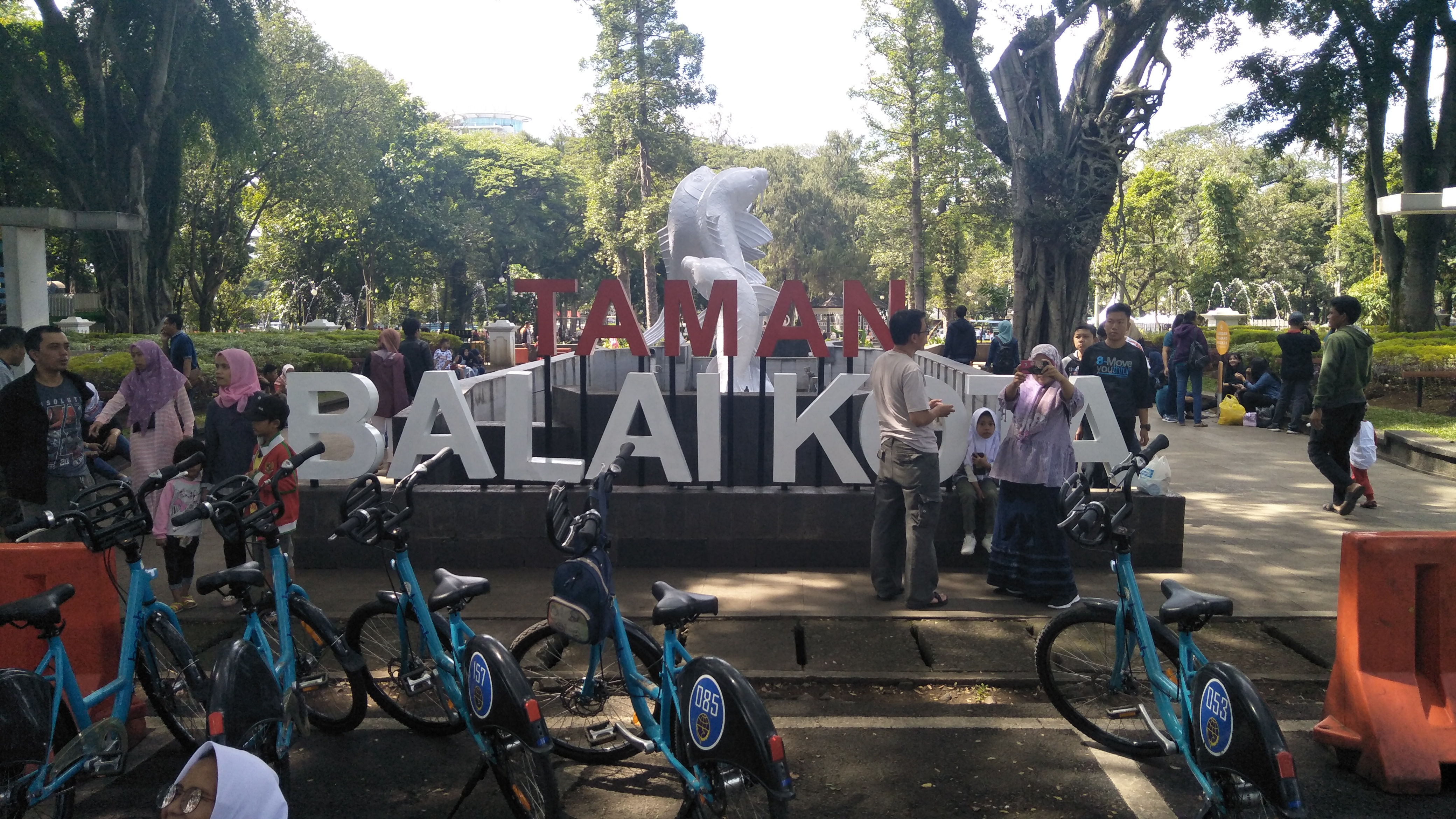 Taman Balai Kota Bandung